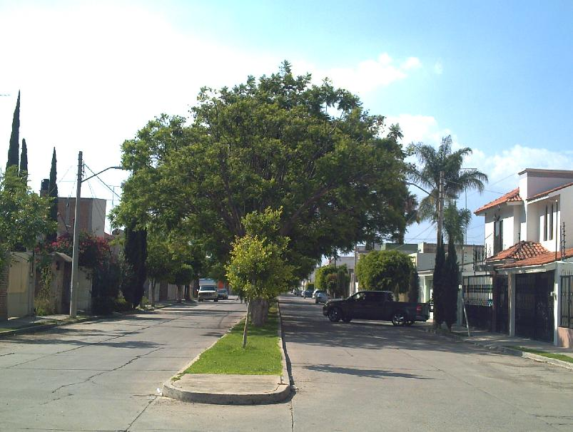 Bulevar de Las Rosas, San Francisco del Rincón